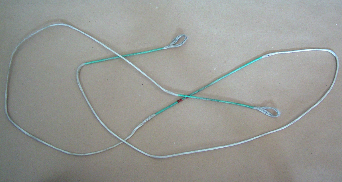 Cięciwa, łuk sportowy